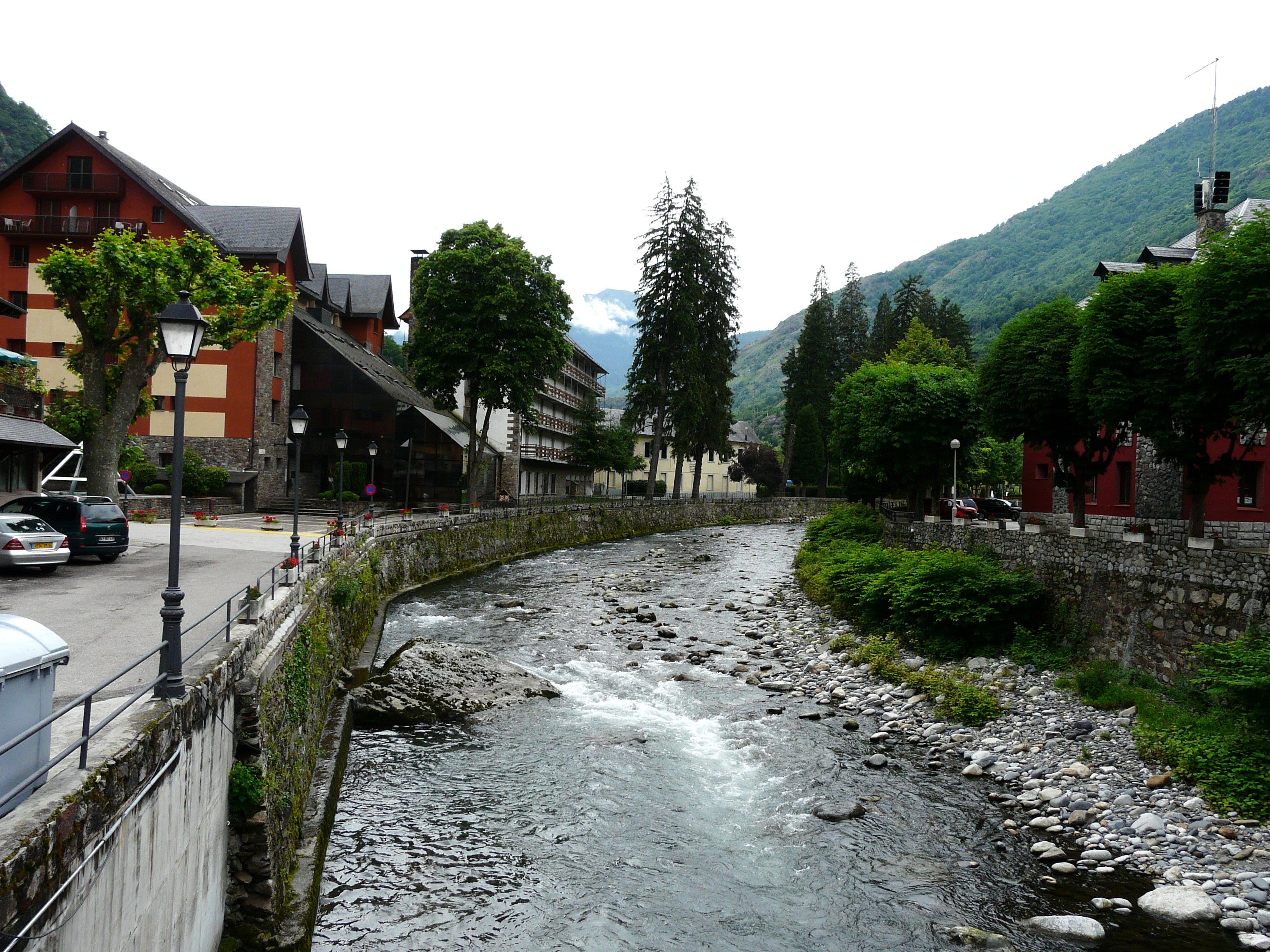 La Garonne en amont du pont de la Baixada Sant Jaum, à Les, Val d'Aran, Catalogne, Espagne.